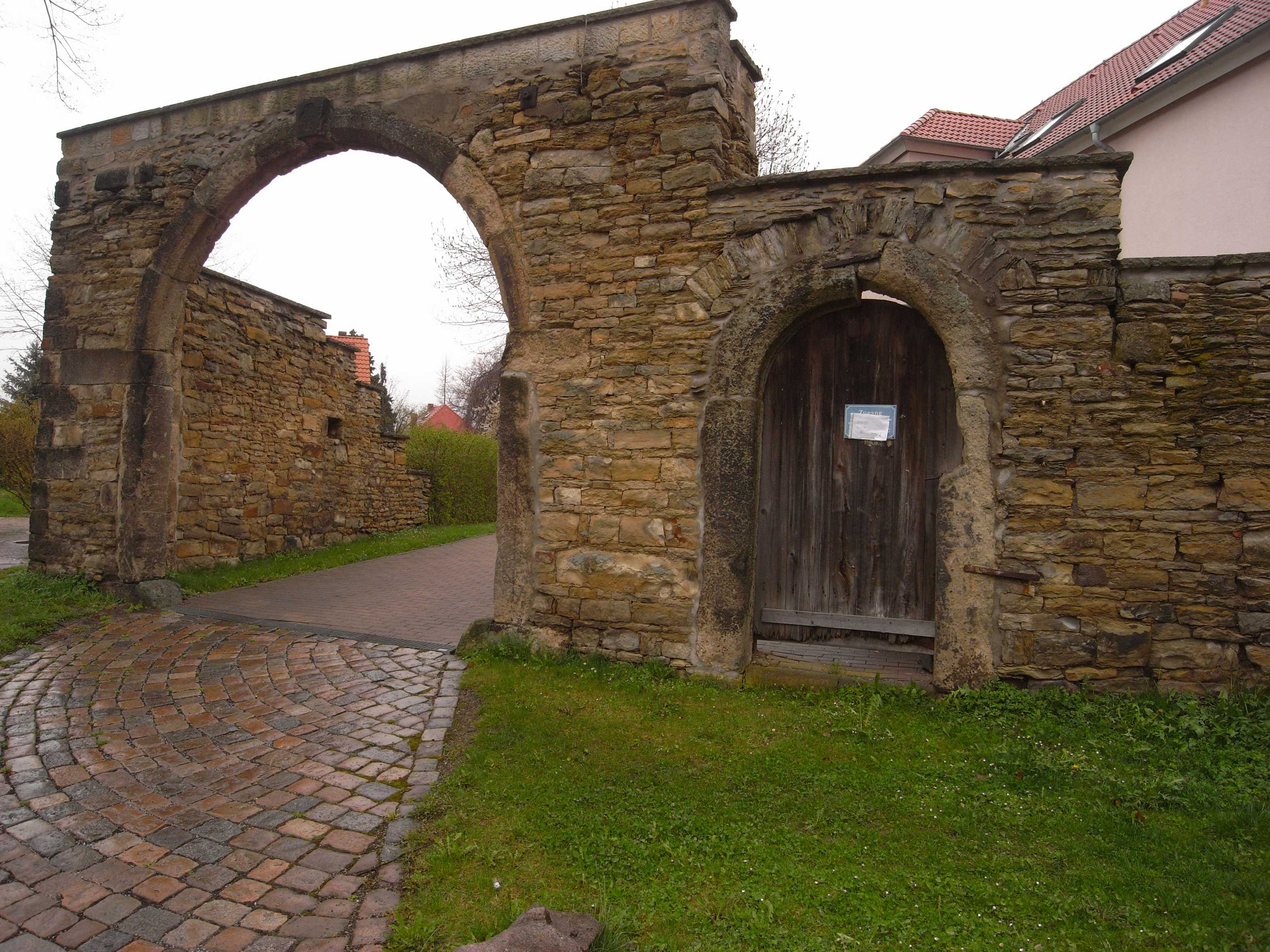 alte Hofeinfahrt Altnaußlitz 7, Dresden